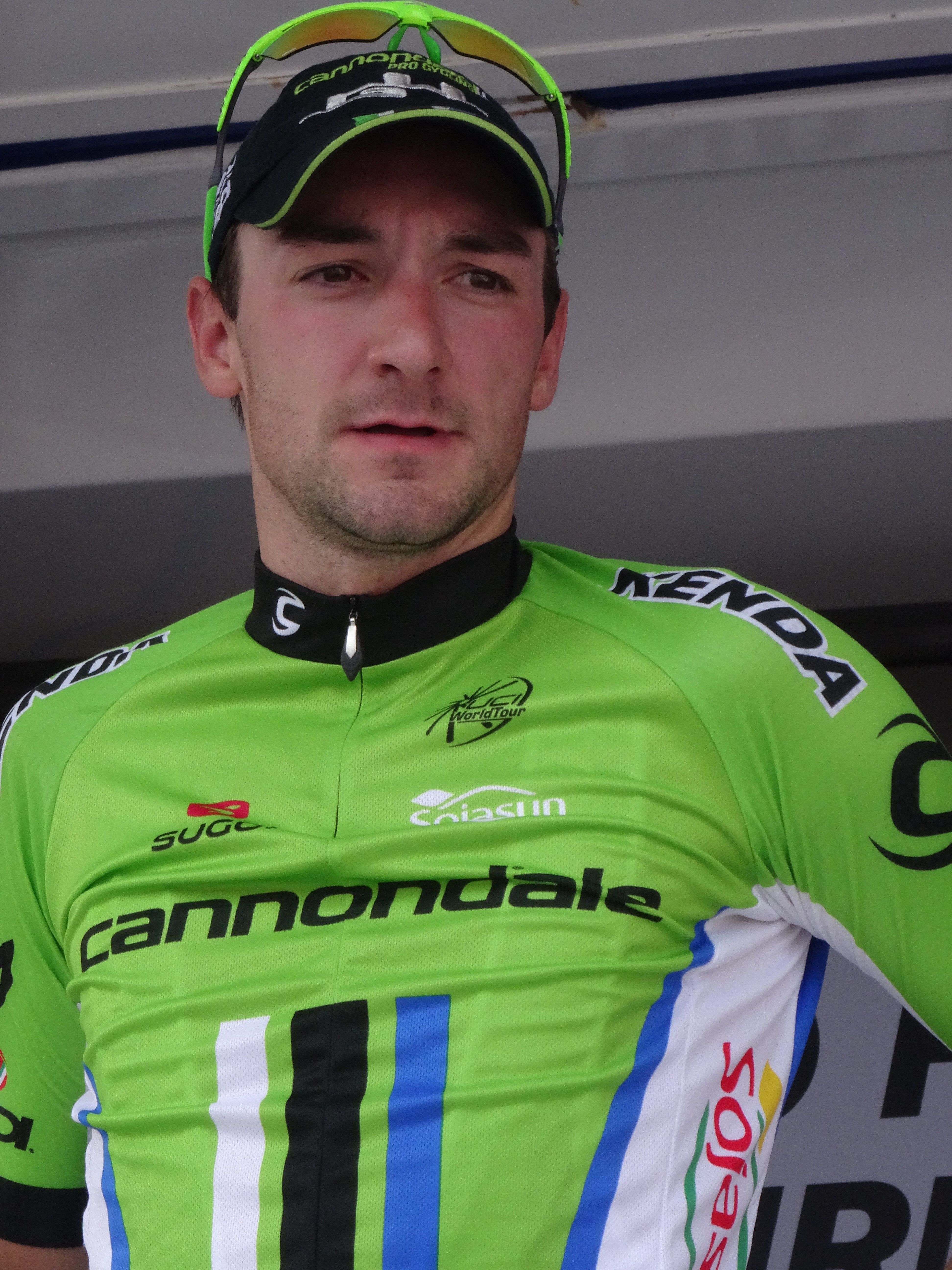 Reportage photographique réalisé le dimanche 7 septembre à l'occasion du départ et de l'arrivée du Grand Prix de Fourmies 2014 à Fourmies, Nord-Pas-de-Calais, France.